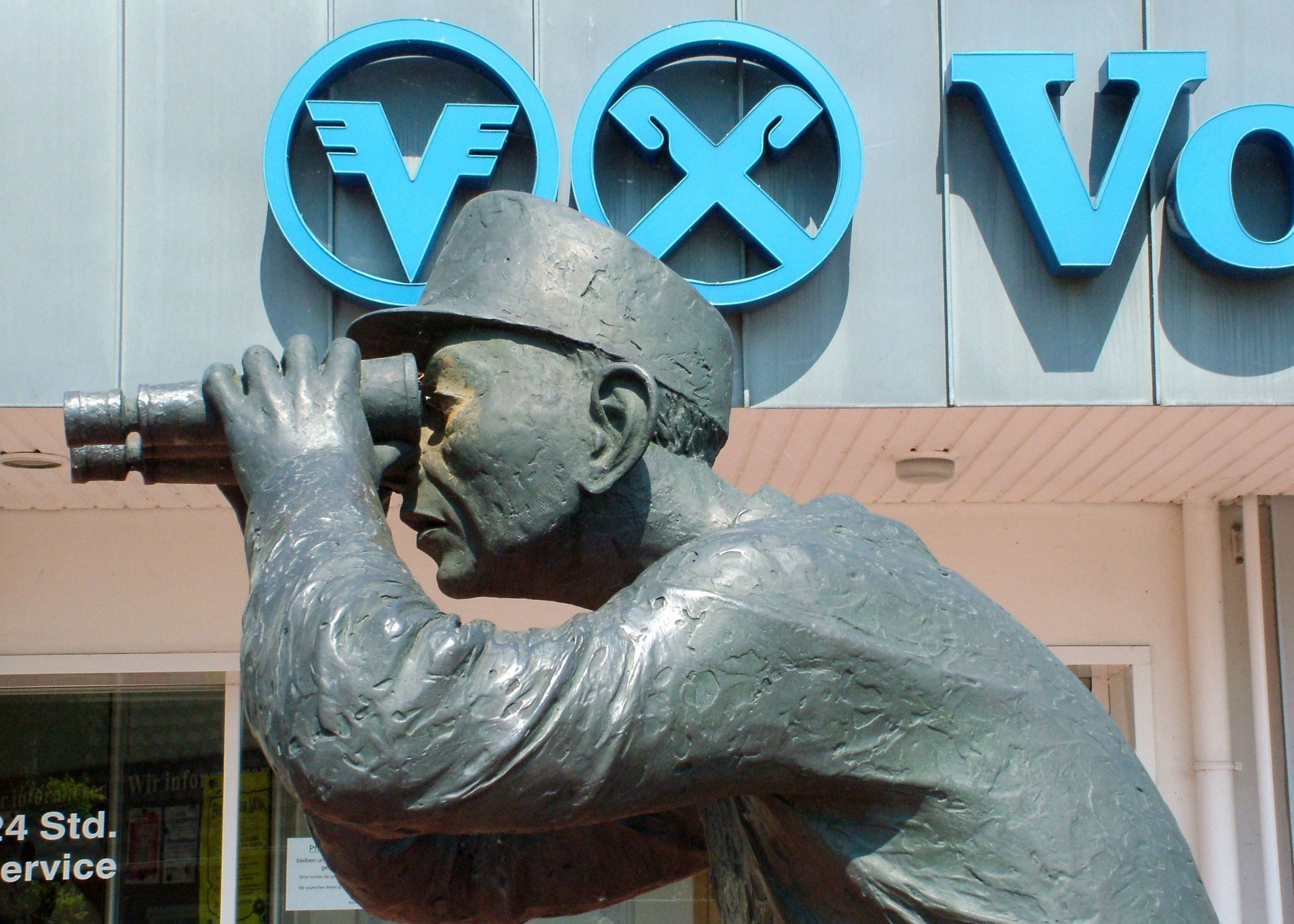 Statue Zöllner, Suderwick